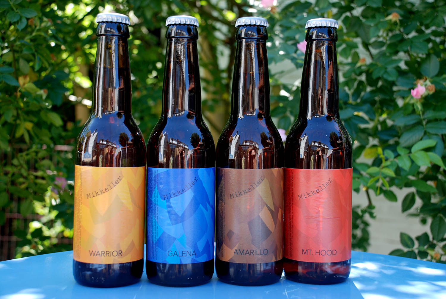 Mikkeller single hops Deens bier